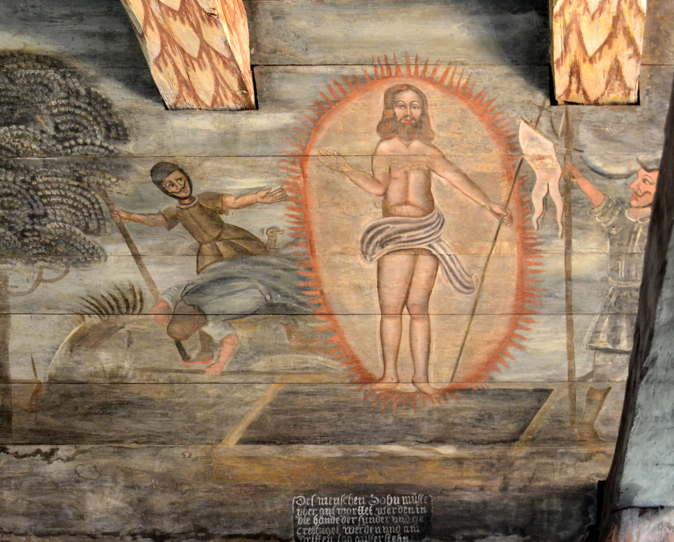 Kościół w Dzisnej (województwo zachodniopomorskie)